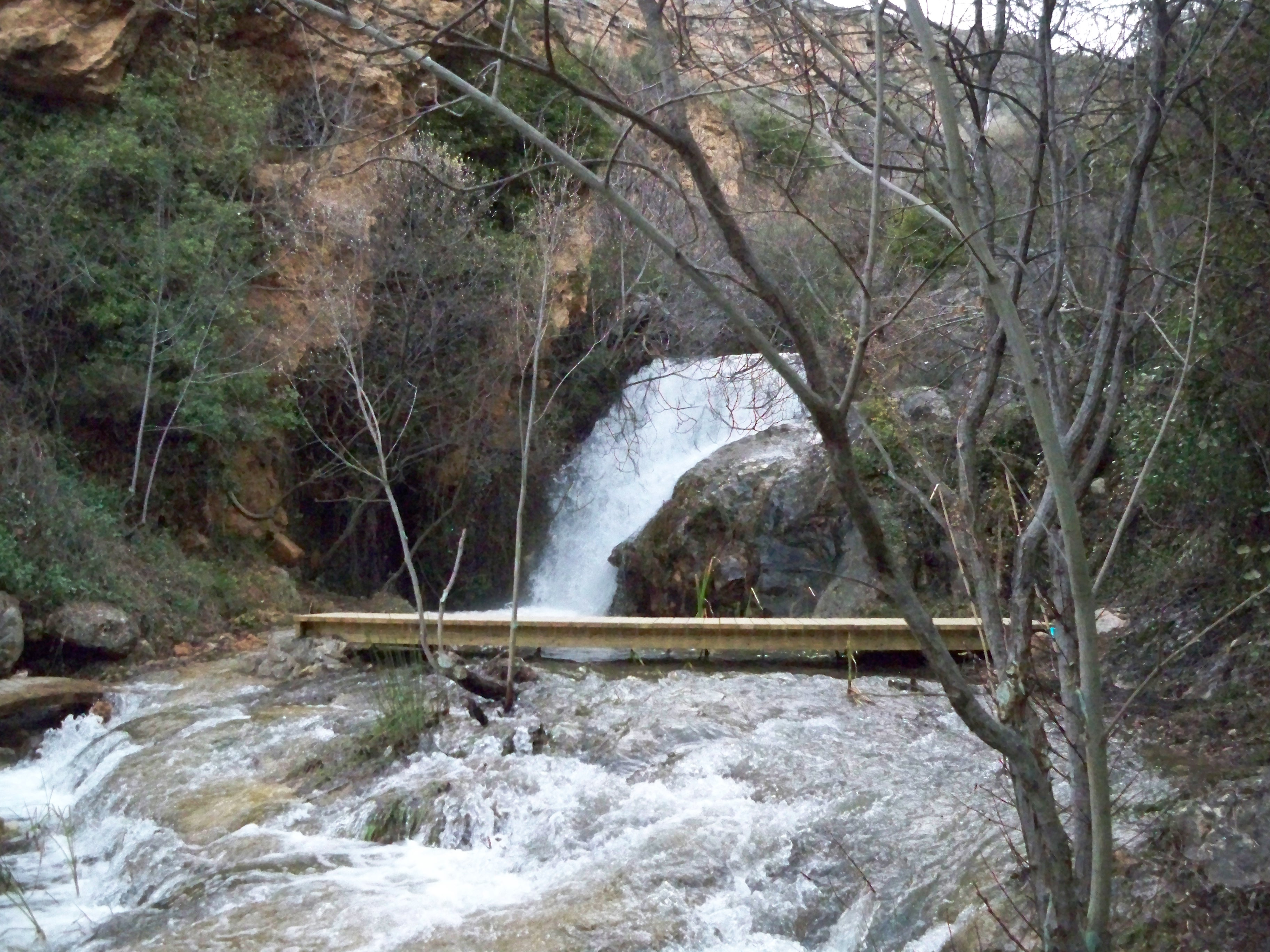 Cascada del Arroyo Morote en Molinicos (Albacete), en la zona conocida como Los Molinos.